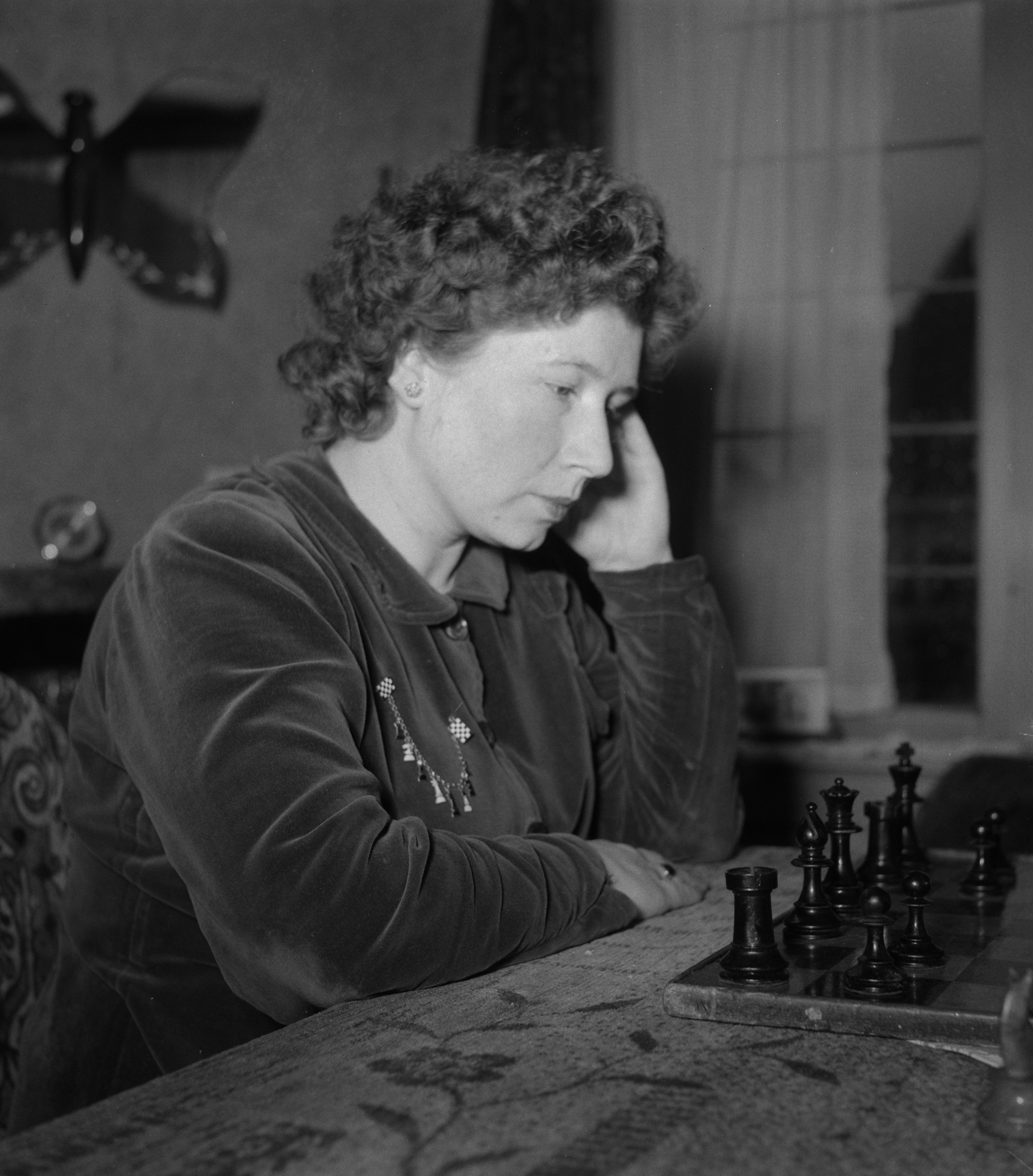 Collectie / Archief : Fotocollectie Anefo Reportage / Serie : [ onbekend ] Beschrijving : Fenny Heemskerk (kampioen damesschaken) met dochter Datum : 10 april 1951 Trefwoorden : DOCHTERS, damesschaken, kampioenen Persoonsnaam : Fenny Heemskerk Fotograaf : Noske, J.D. / Anefo Auteursrechthebbende : Nationaal Archief Materiaalsoort : Negatief (zwart/wit) Nummer archiefinventaris : bekijk toegang 2.24.01.03 Bestanddeelnummer : 904-5146